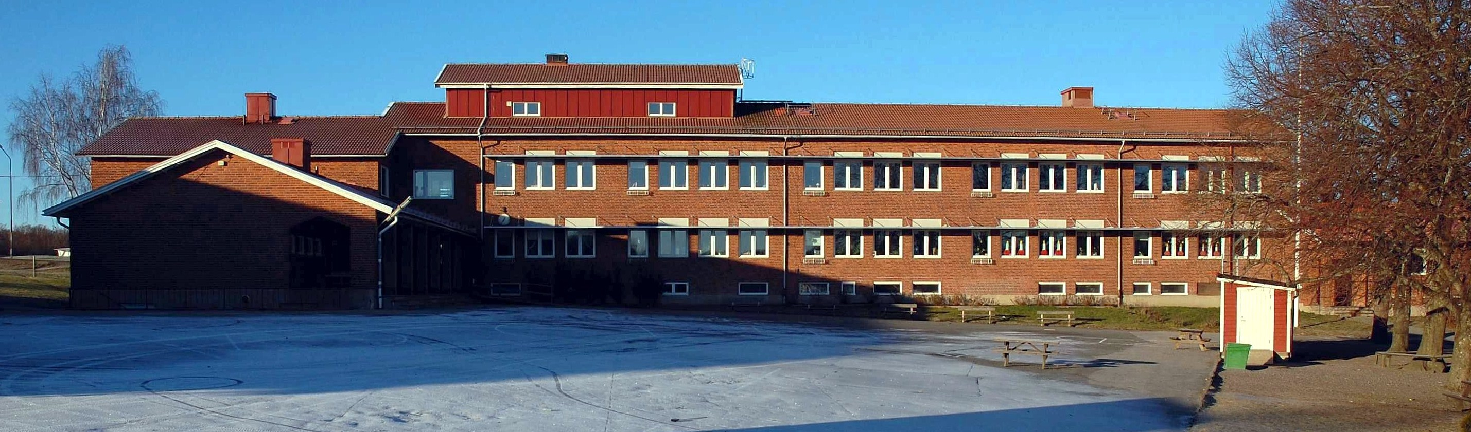 Centrumskolan i Munkedal, byggnad uppförd 1954